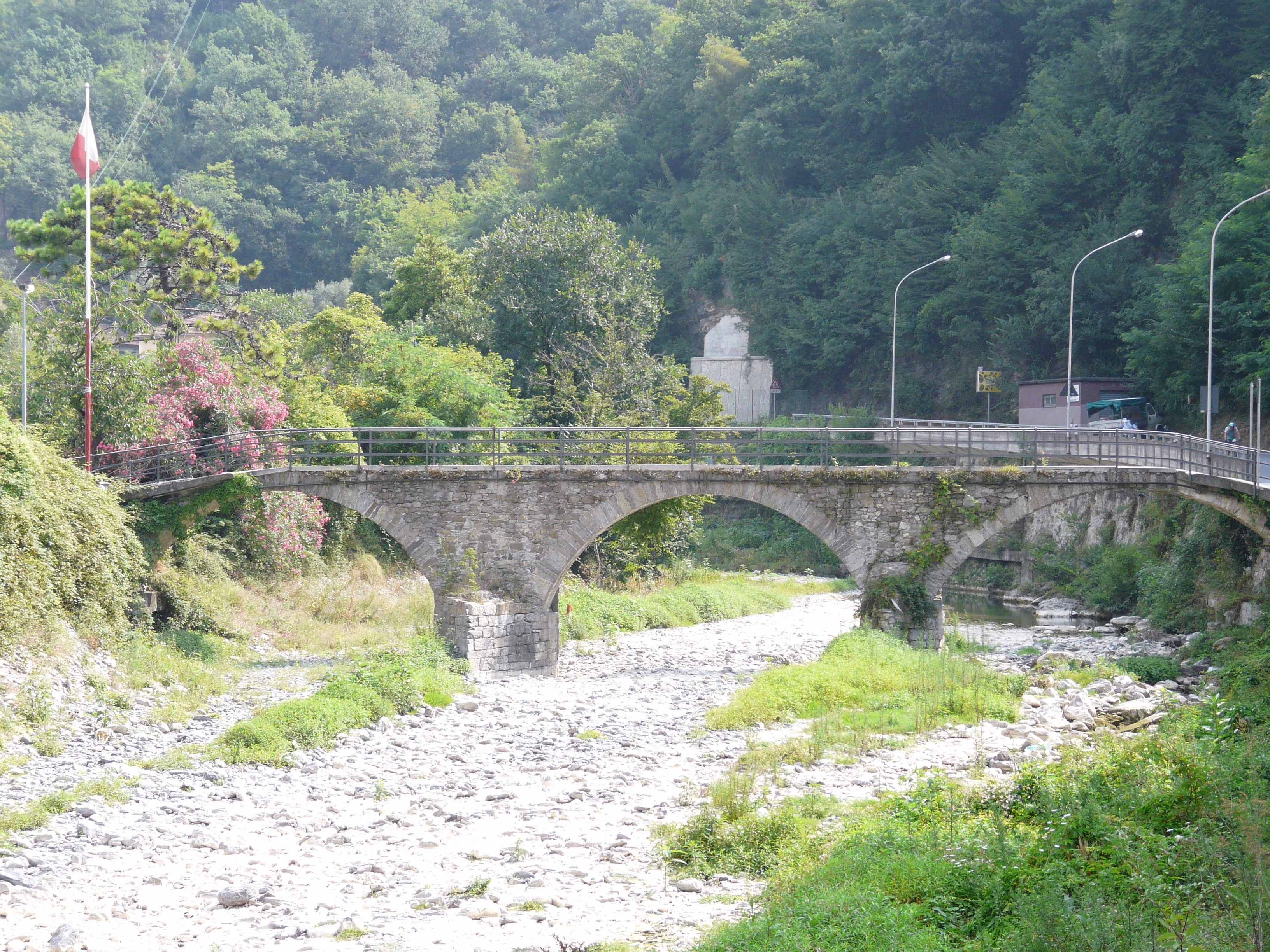 Ponte antico sul torrente Recco presso il quartiere di Verzemma, Recco, Liguria, Italia